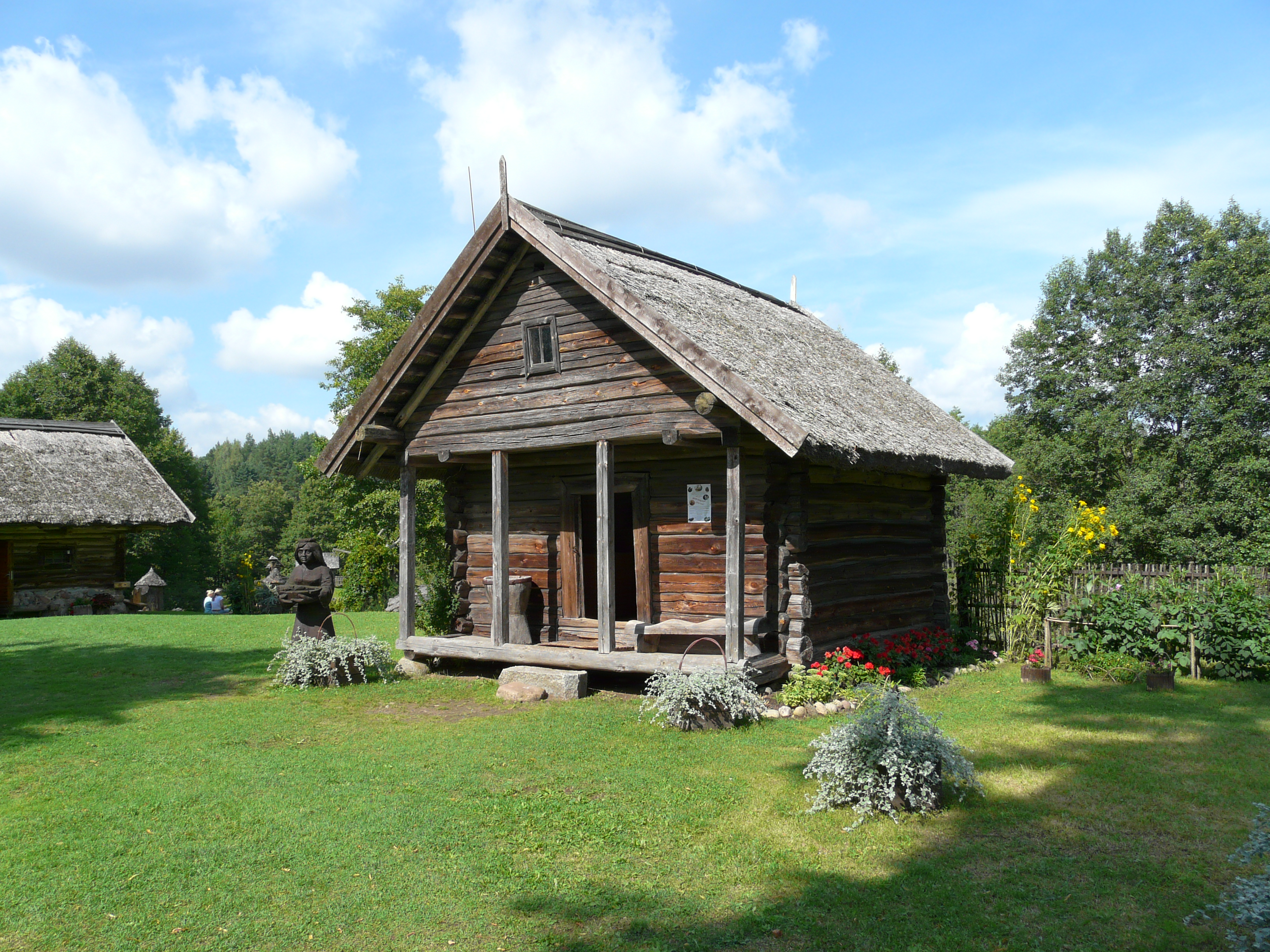 Bitininkystės muziejus